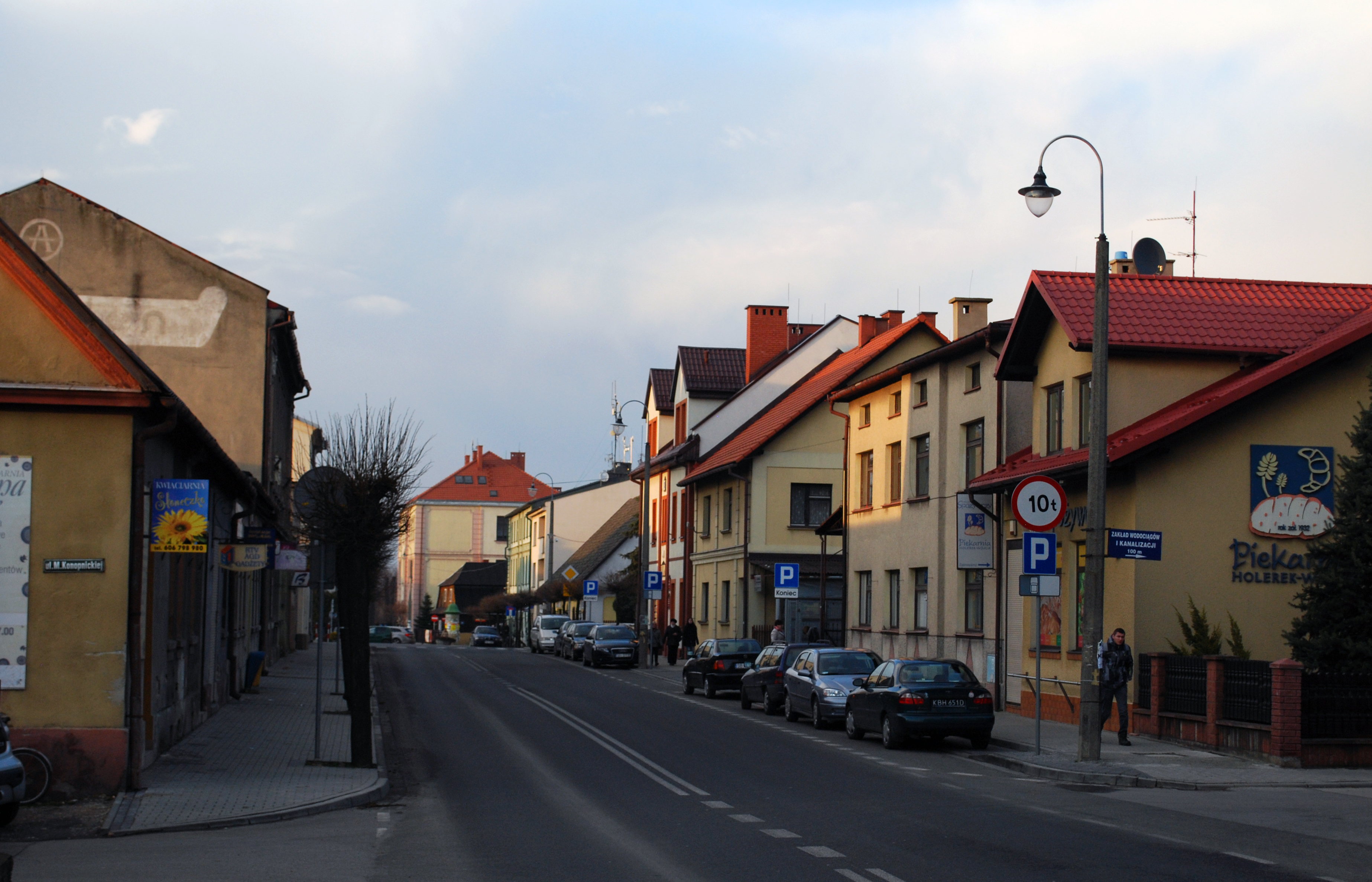 Wilamowice ul. Jana Paderewskiego